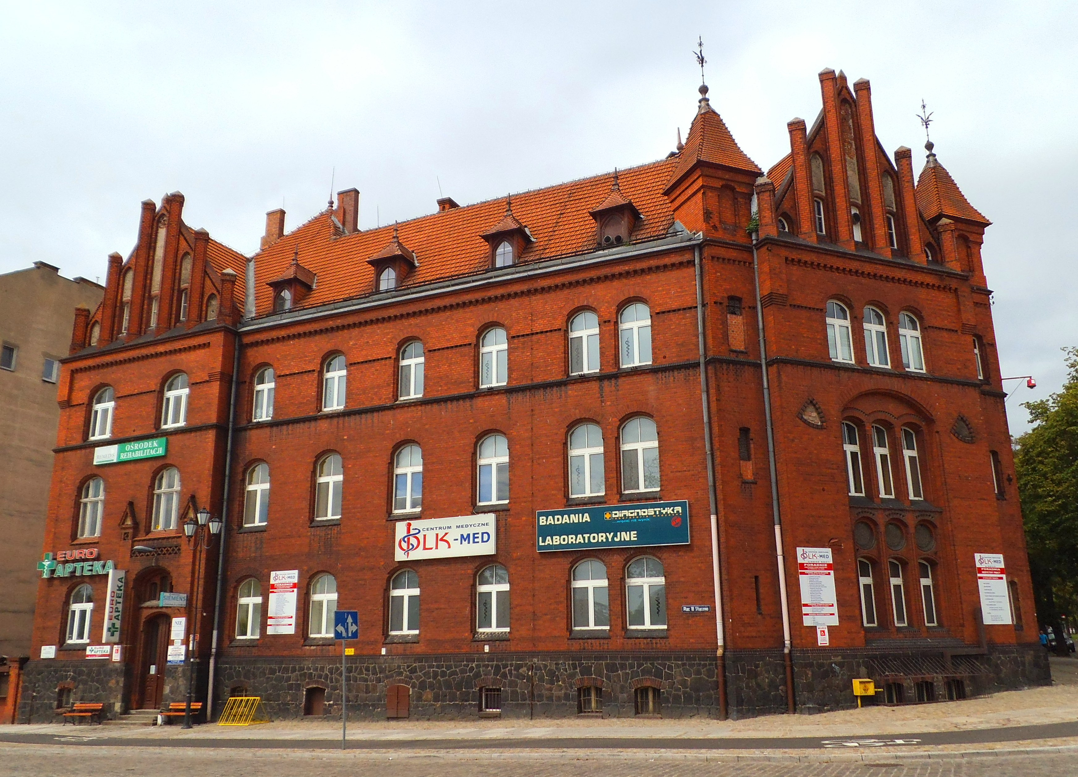 siedziba Inspektoratu Kolei Królewskiej w Toruniu